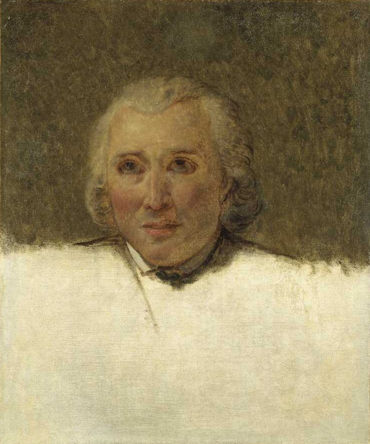 L'abbé Grégoire, étude pour le Serment du jeu de paume par Jacques-Louis David, Besançon, Musée des Beaux-arts. Européana par Jacques-Louis David, crayon noir, collection privée.